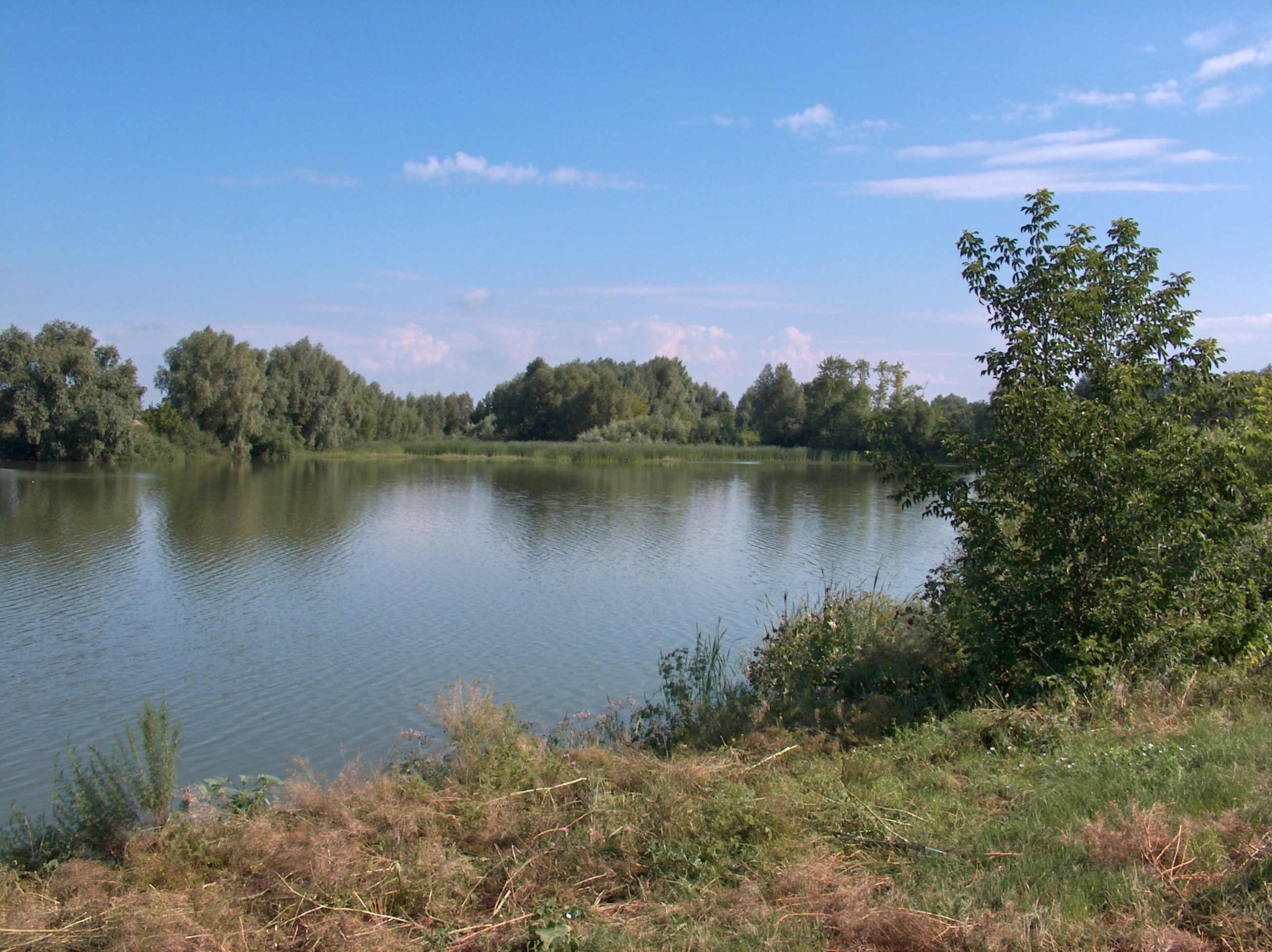 Озеро в селе Утёвка, Нефтегорского района Самарской области Фотография озера в селе Утёвка, Нефтегорского района Самарской области, 17 июля 2007 года